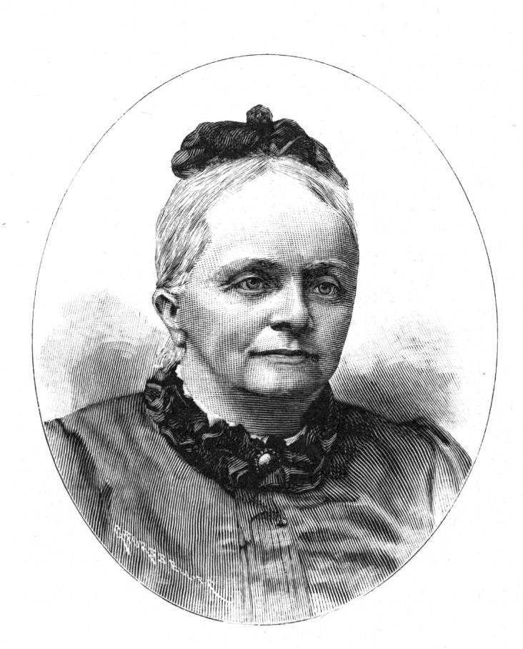 Johanna Christina von Hofsten (1832-1913)